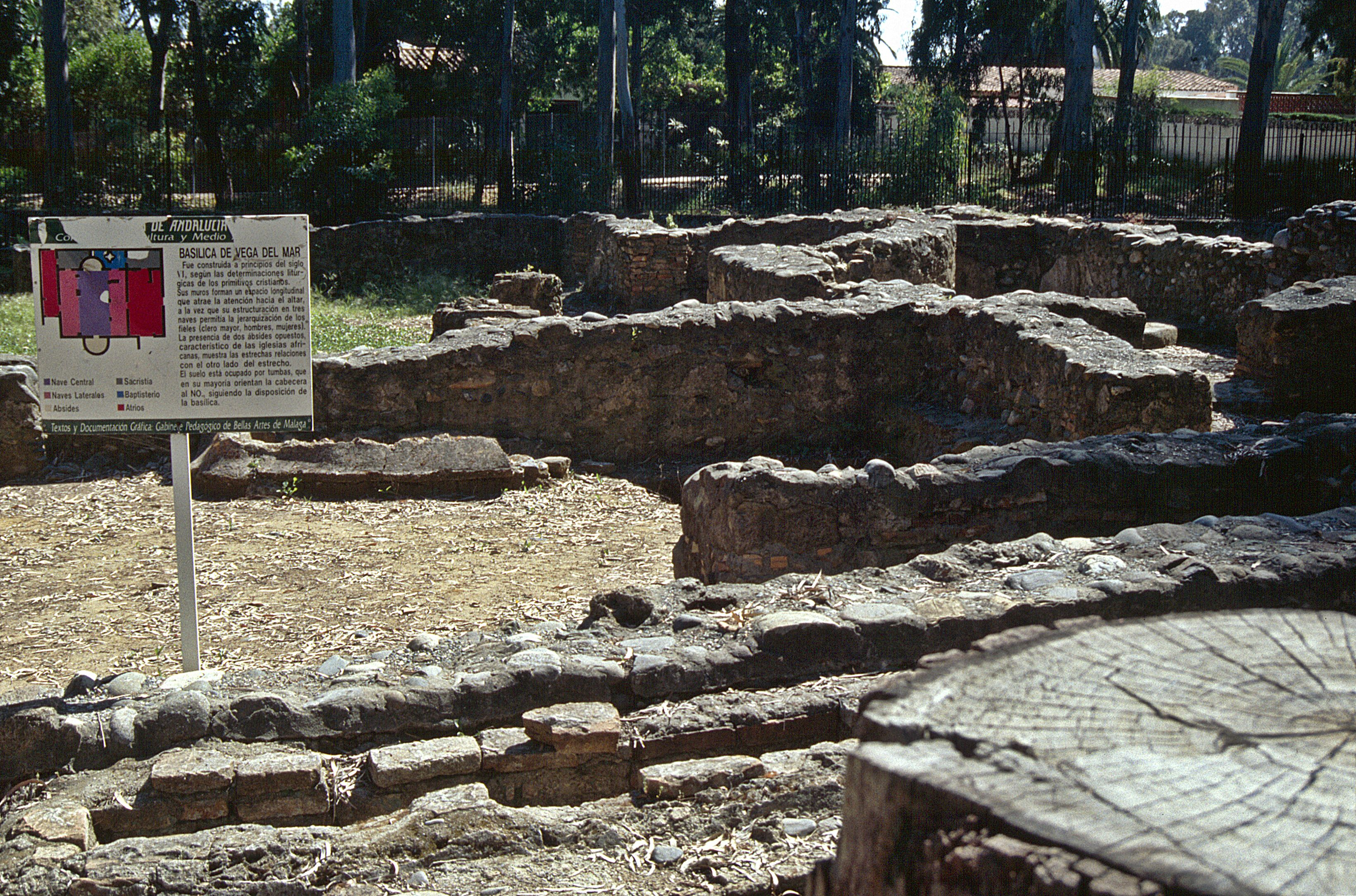 San Pedro Alcántara: Ruinen der altchristlichen Basilika Vega del Mar